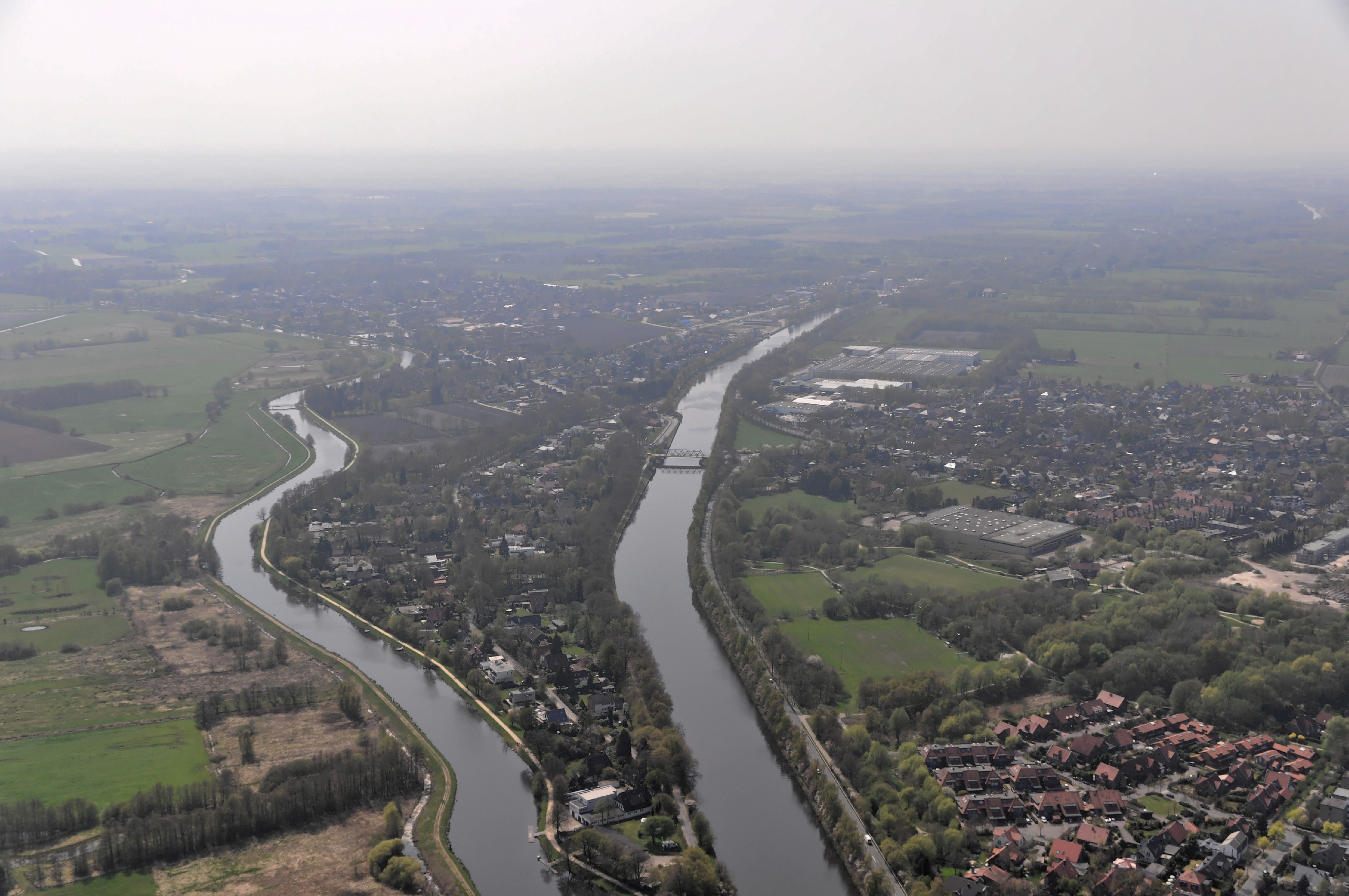 Luftbilder von der Nordseeküste 2013-05